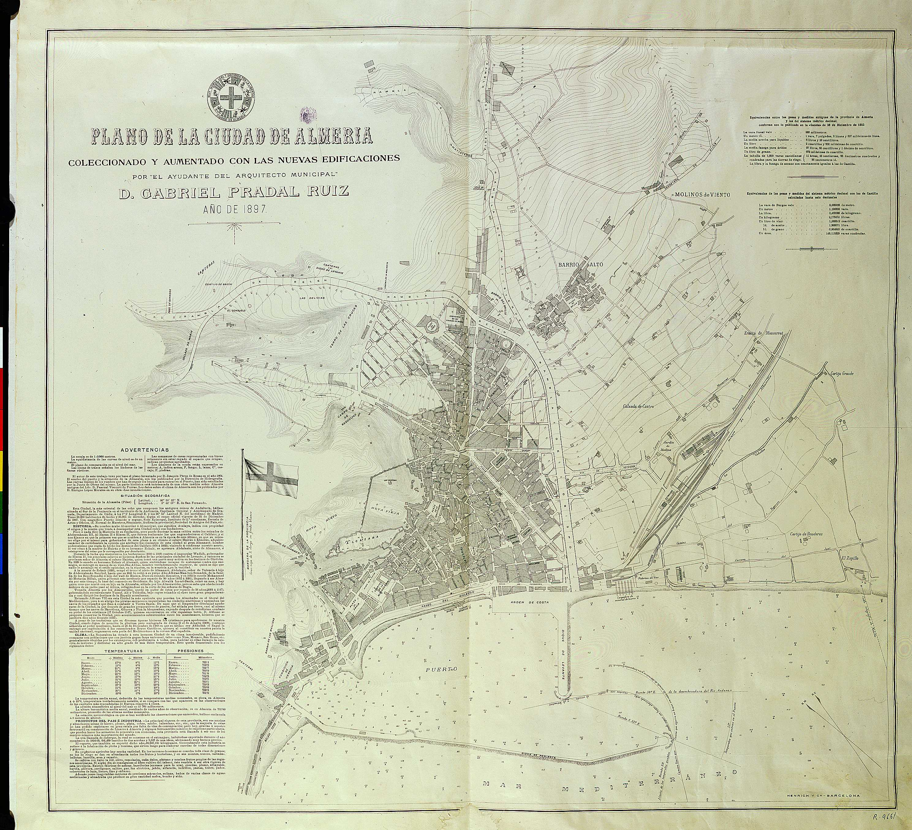 Inserta tabla de equivalencias de medidas. - Orientado con flecha al Norte verdadero al NNO. y norte magnético Bandera de la provincia